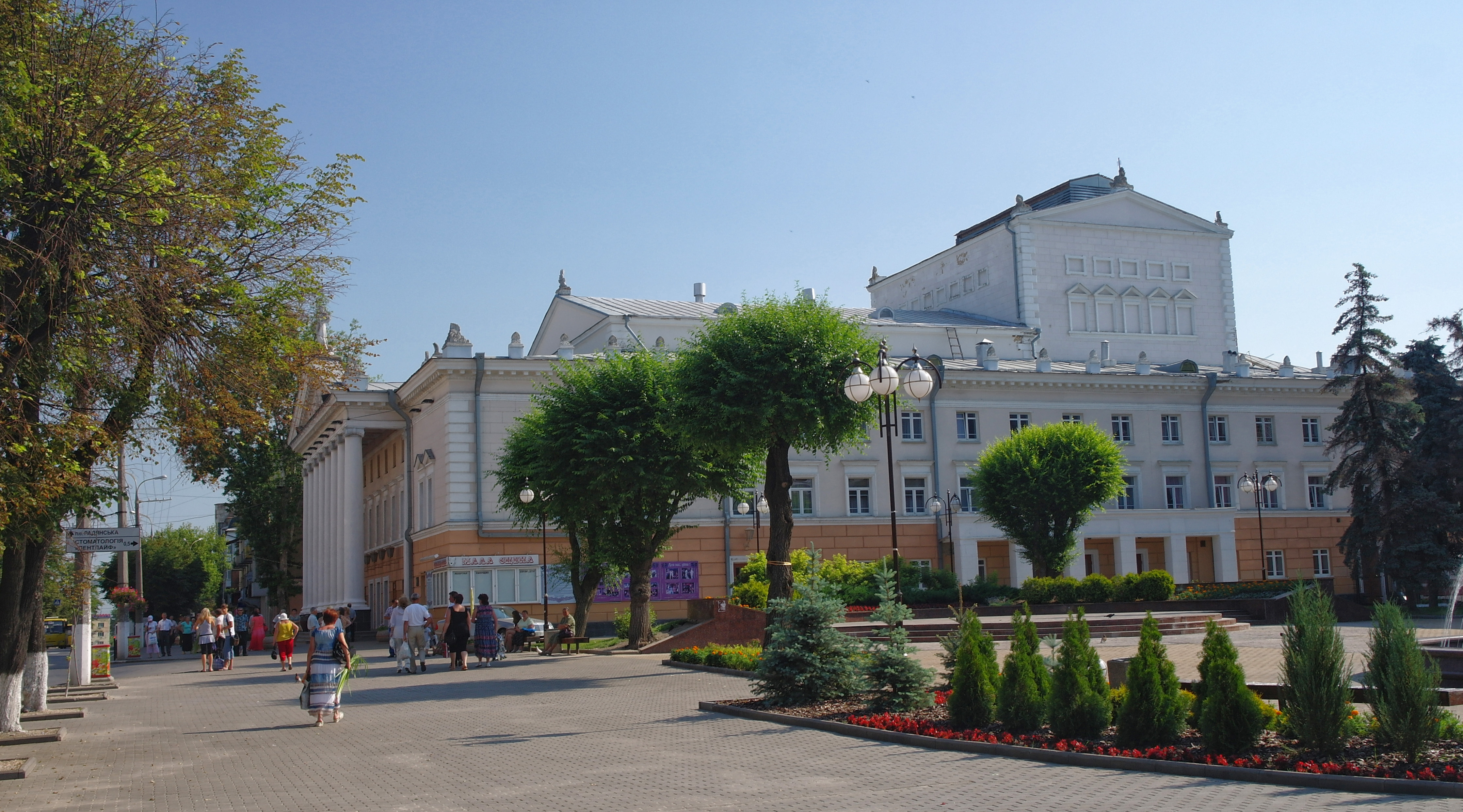 Вінниця, Театральна, 13 Музично-драматичний театр ім. М. К. Садовського